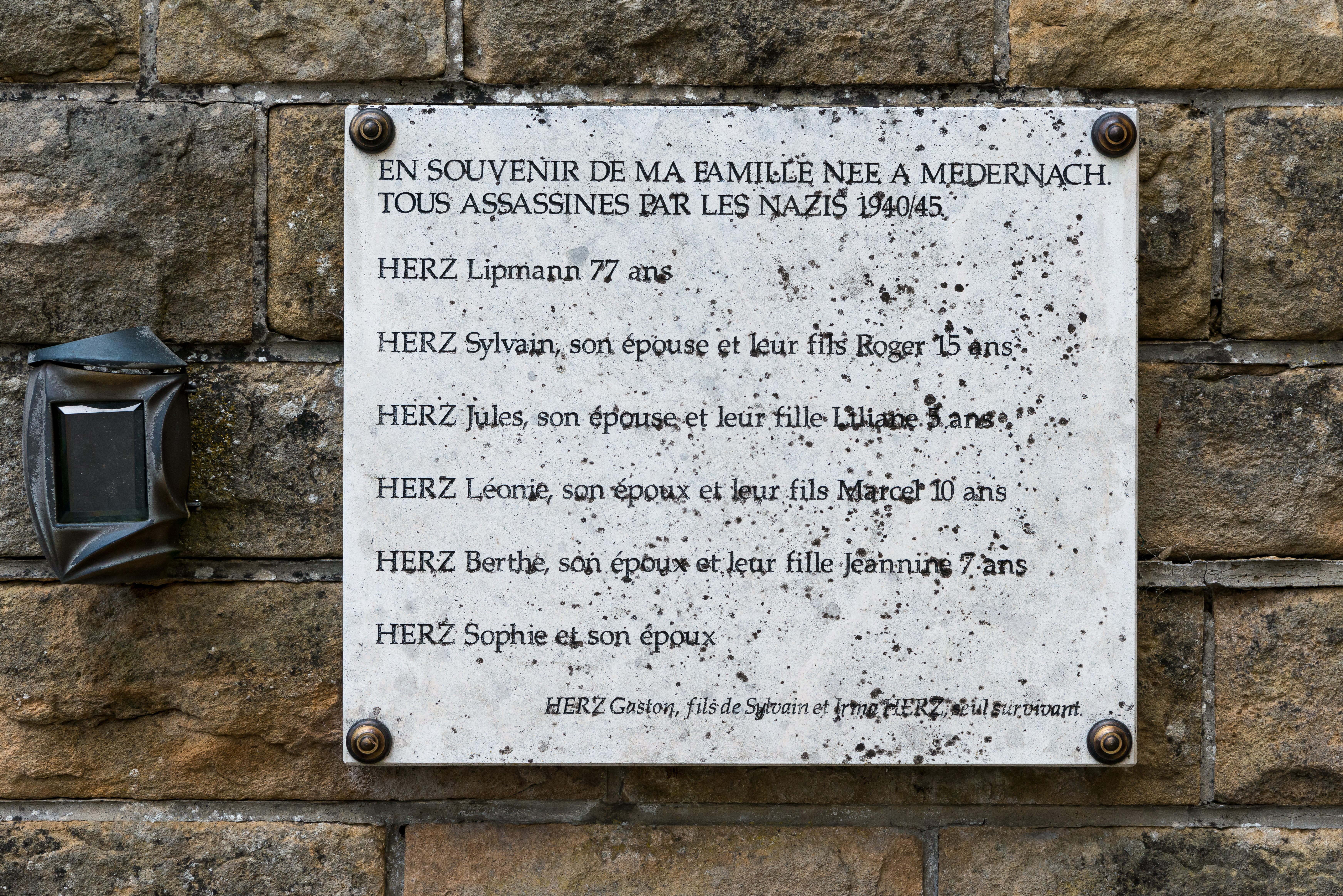 D'Monument «À la Mémoire de la Communauté Israélite de Medernach» an der Rue de Savelborn zu Miedernach.